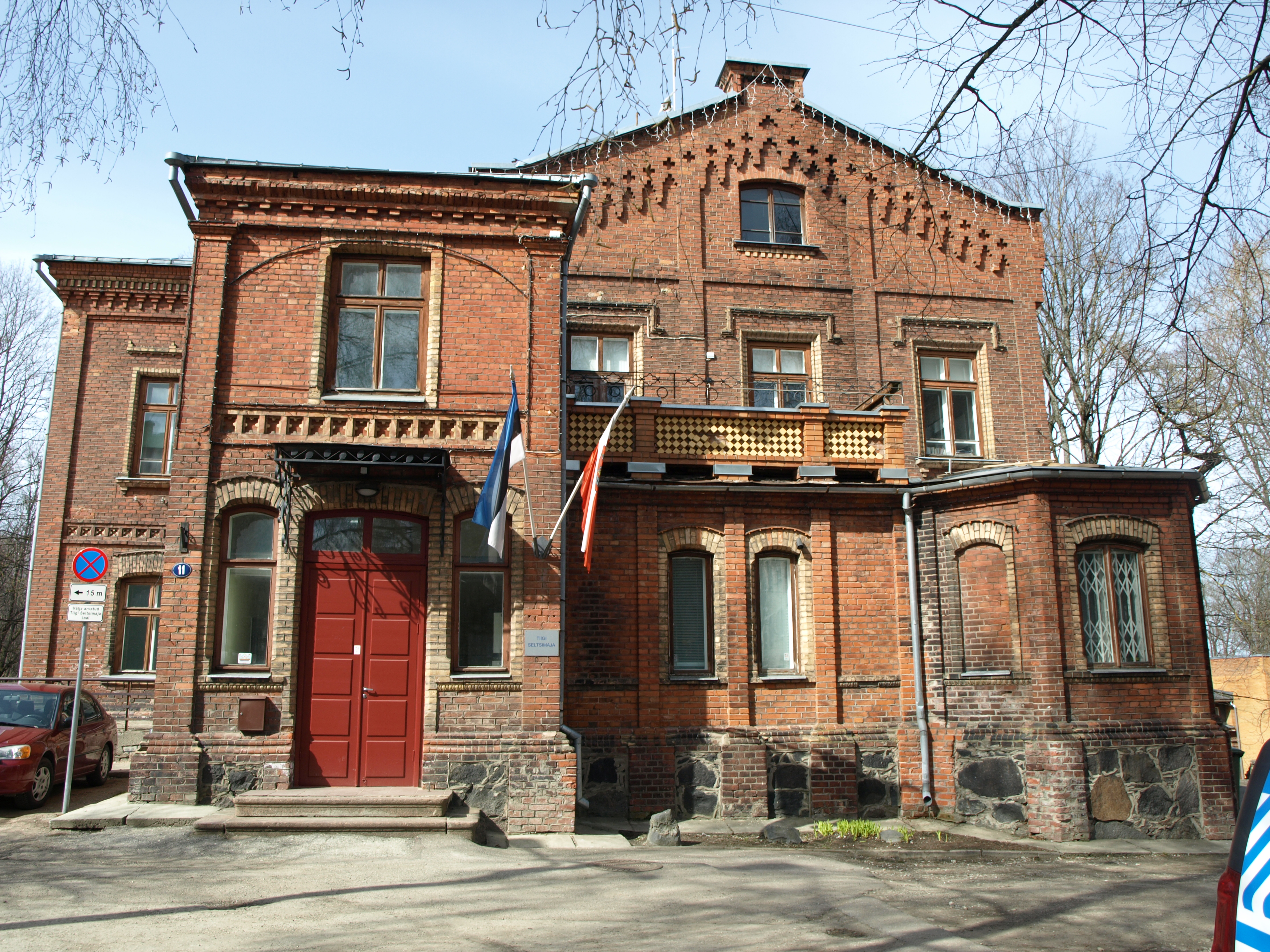 A.v.Oettingeni elamu Tartus Tiigi 11, 1879-1880.a.